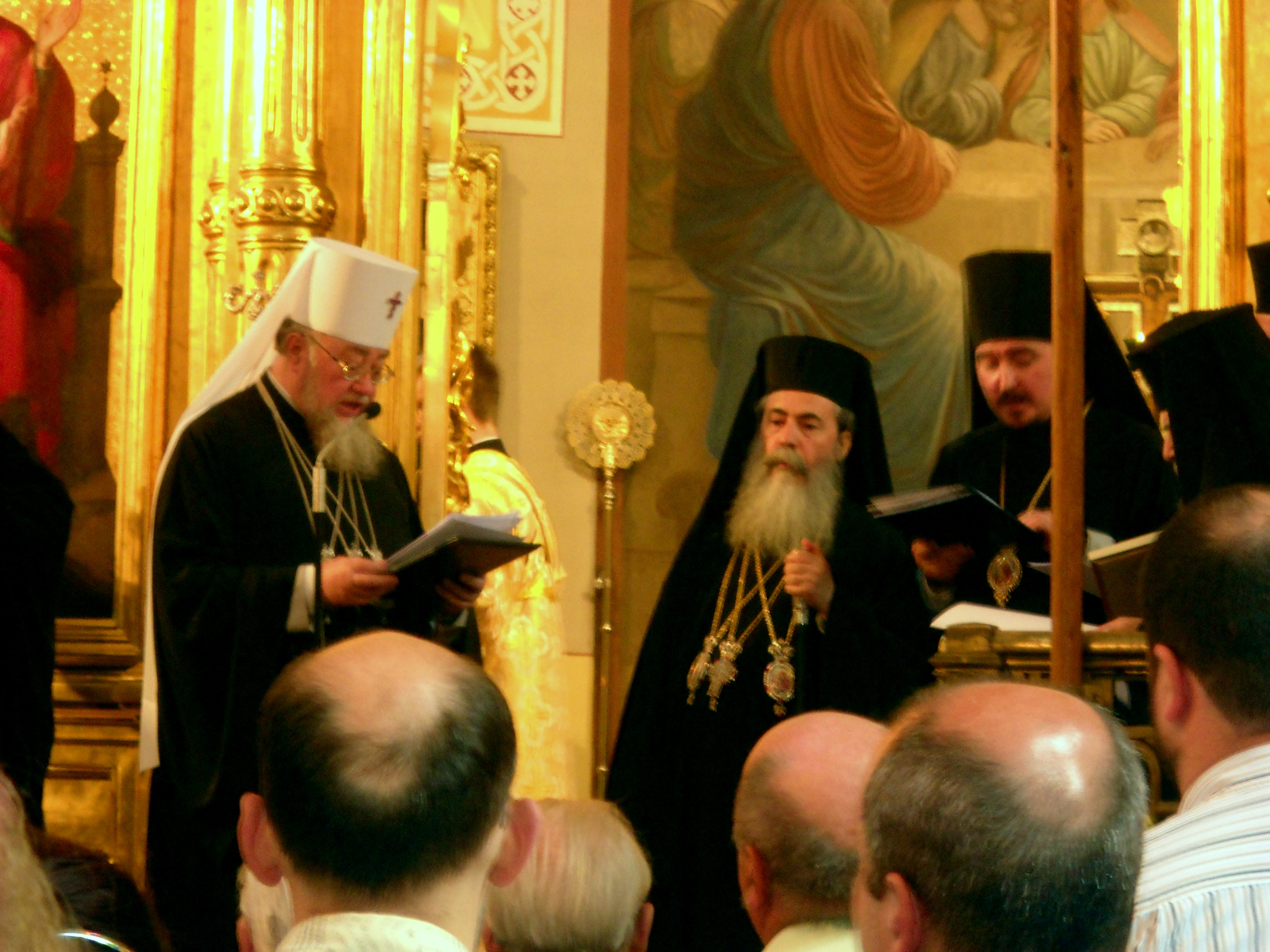 Metropolita warszawski i całej Polski Sawa żegna patriarchę jerozolimskiego Teofila III na zakończenie jego wizyty w PAKP. Obok biskup siemiatycki Jerzy.